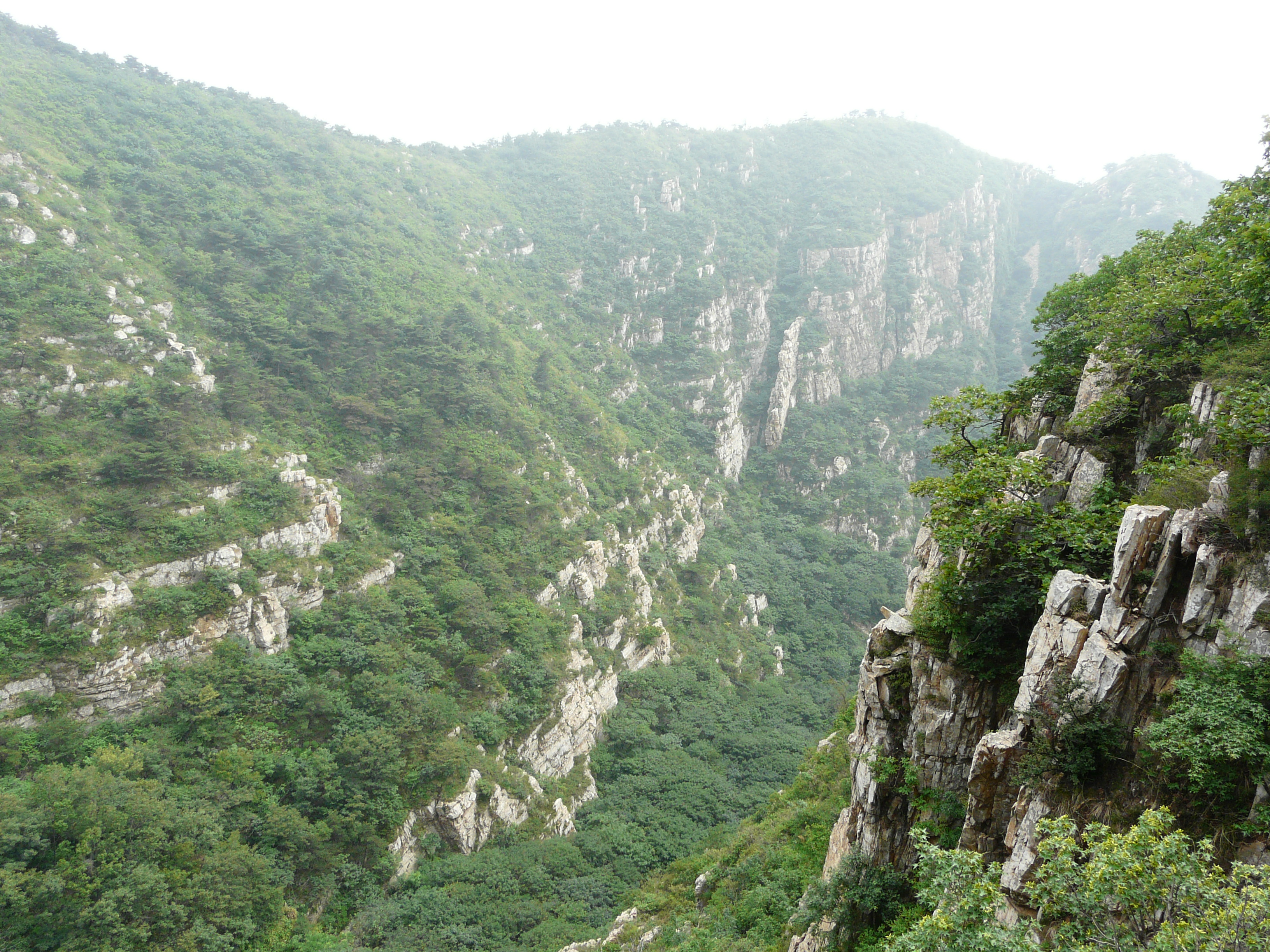 中国辽宁省大连市金州区 大黑山